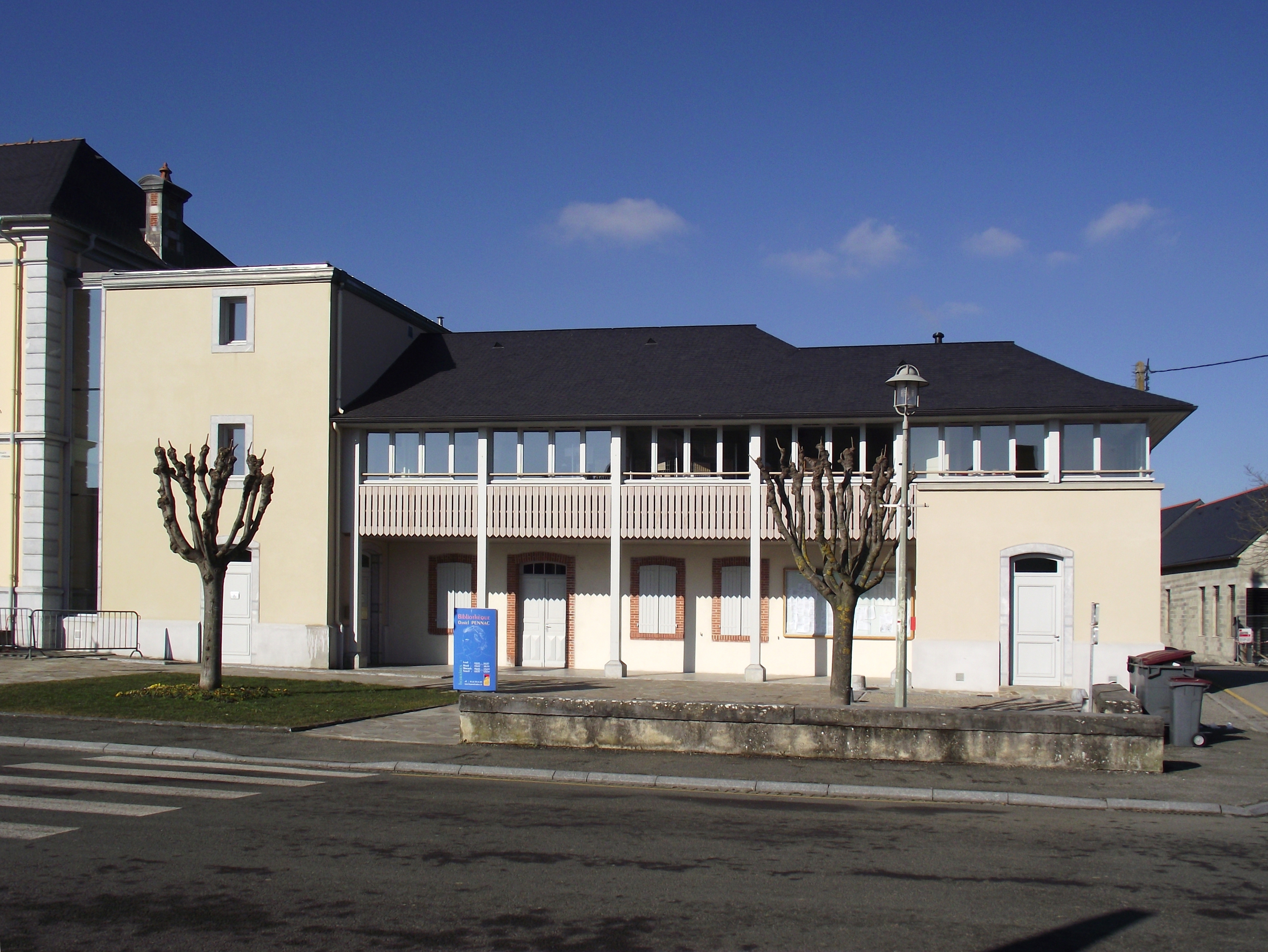 Bibliothèque Daniel Pennac (Ibos, Hautes-Pyrénées, France)